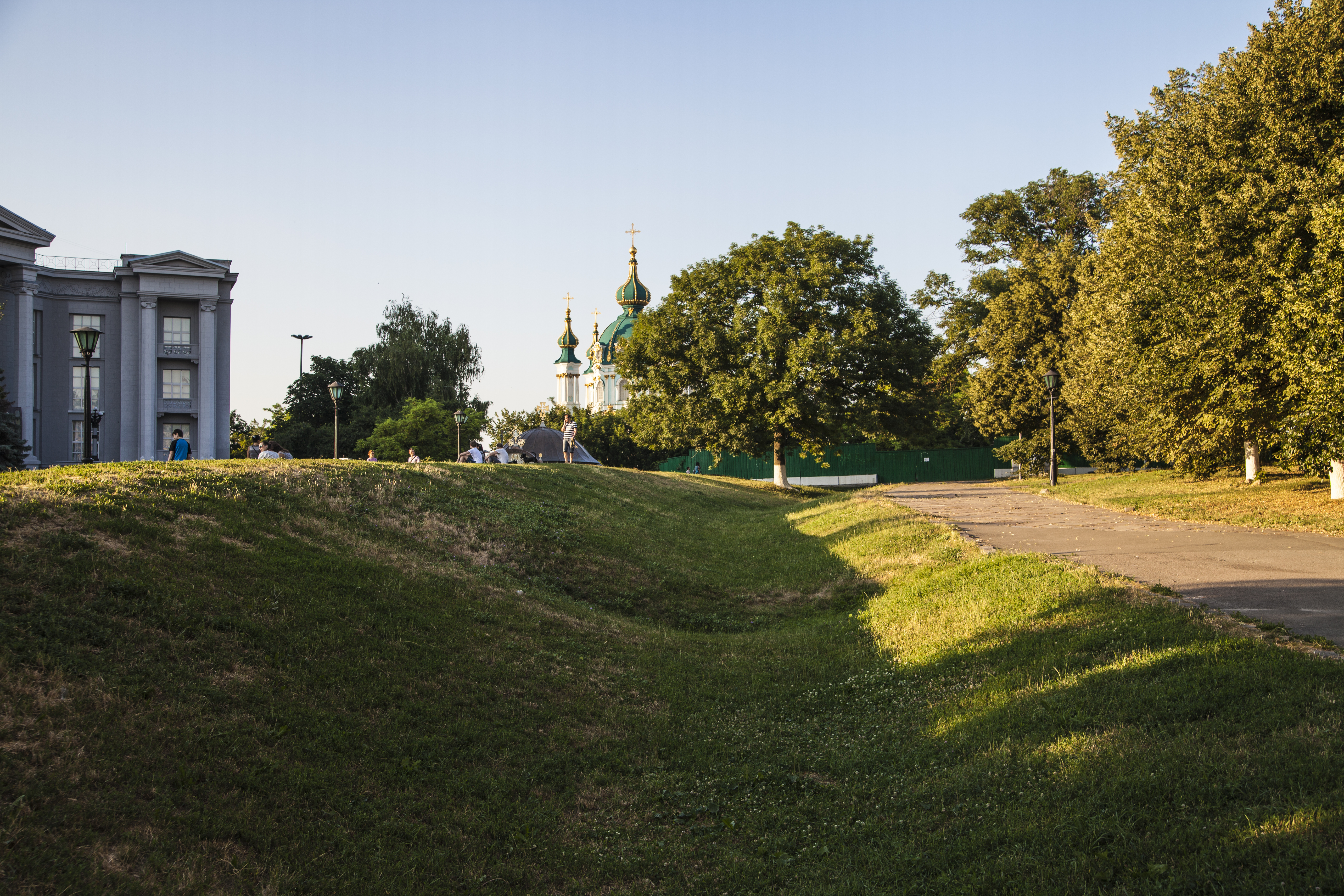 Сучасна реконструкція